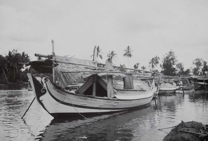 foto. Een Madurese prauw op de Martapura-rivier, Bandjermasin